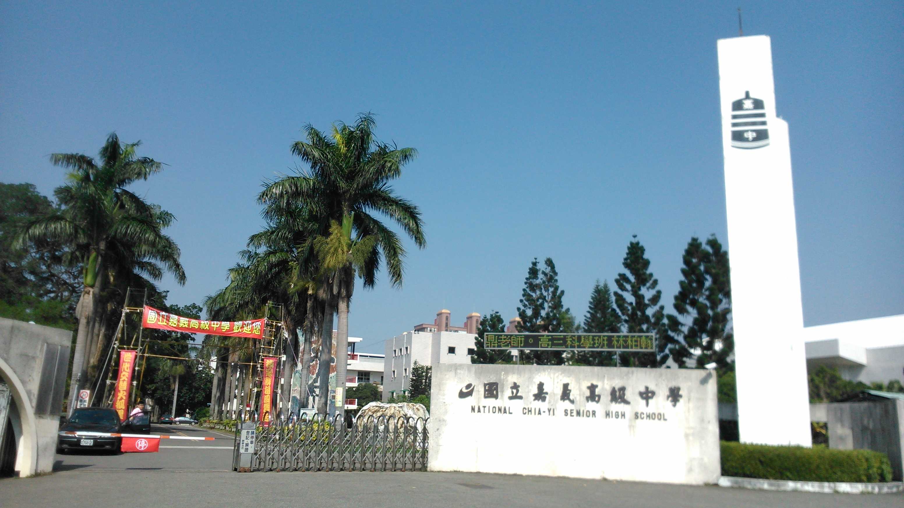 嘉中の正門 中文（台灣）: 嘉義高中正門